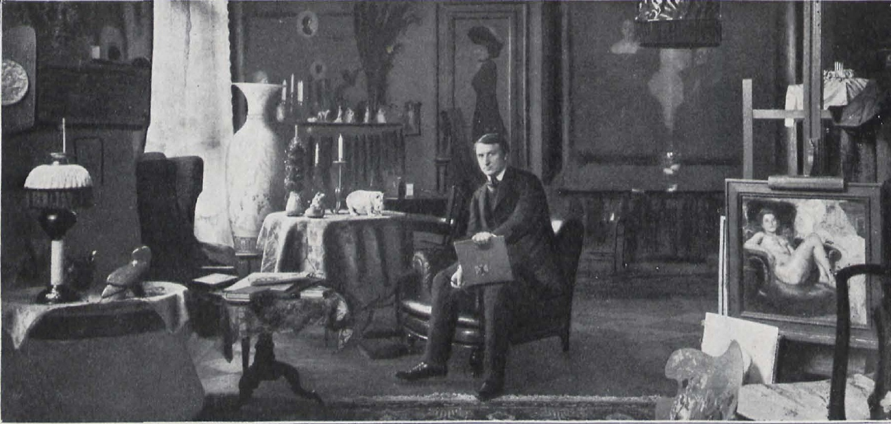 Der Maler Ernst Heilemann in seinem Berliner Atelier, 1902.